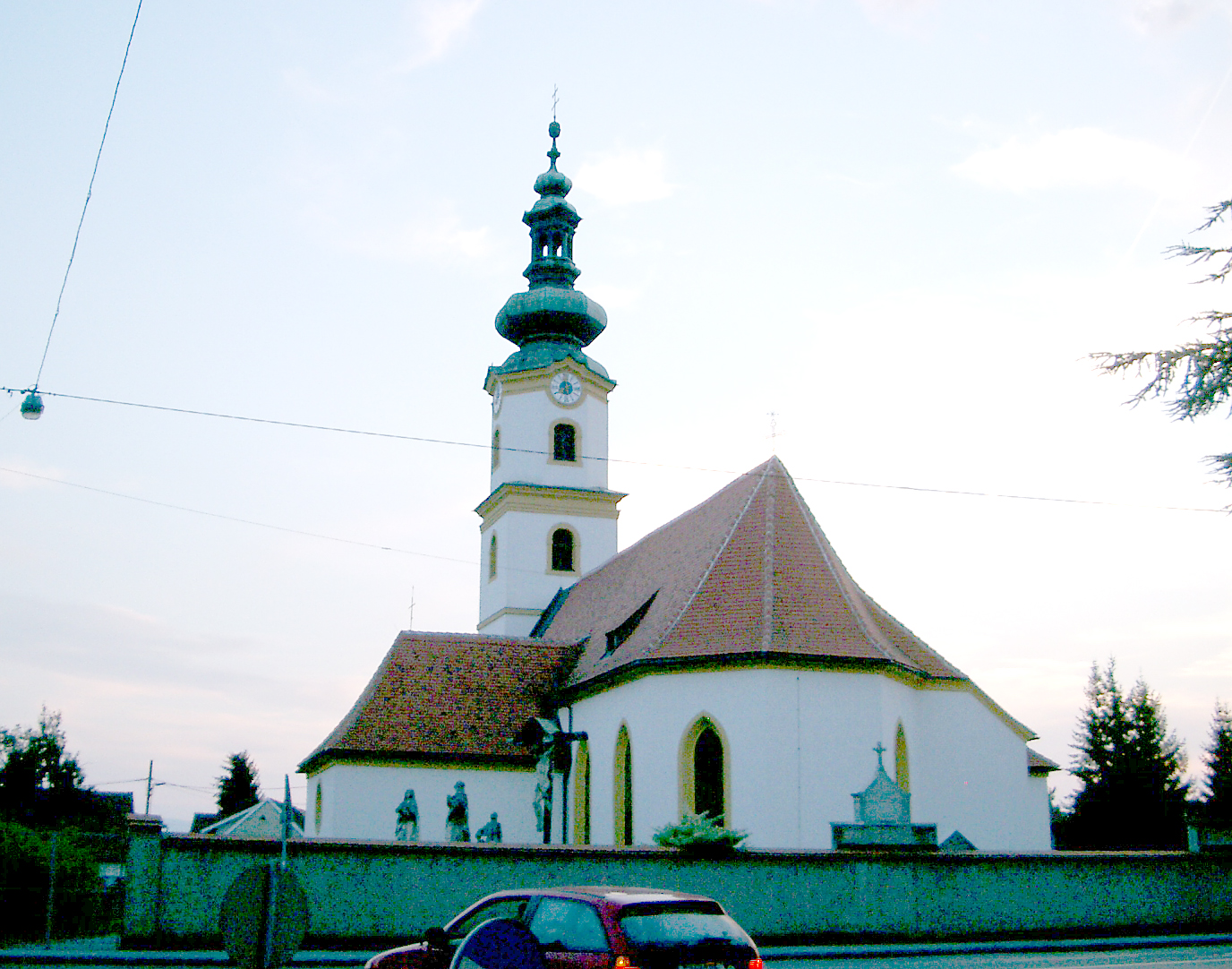 Pfarrkirche Hl. Johannes der Täufer in Feldkirchen bei Graz